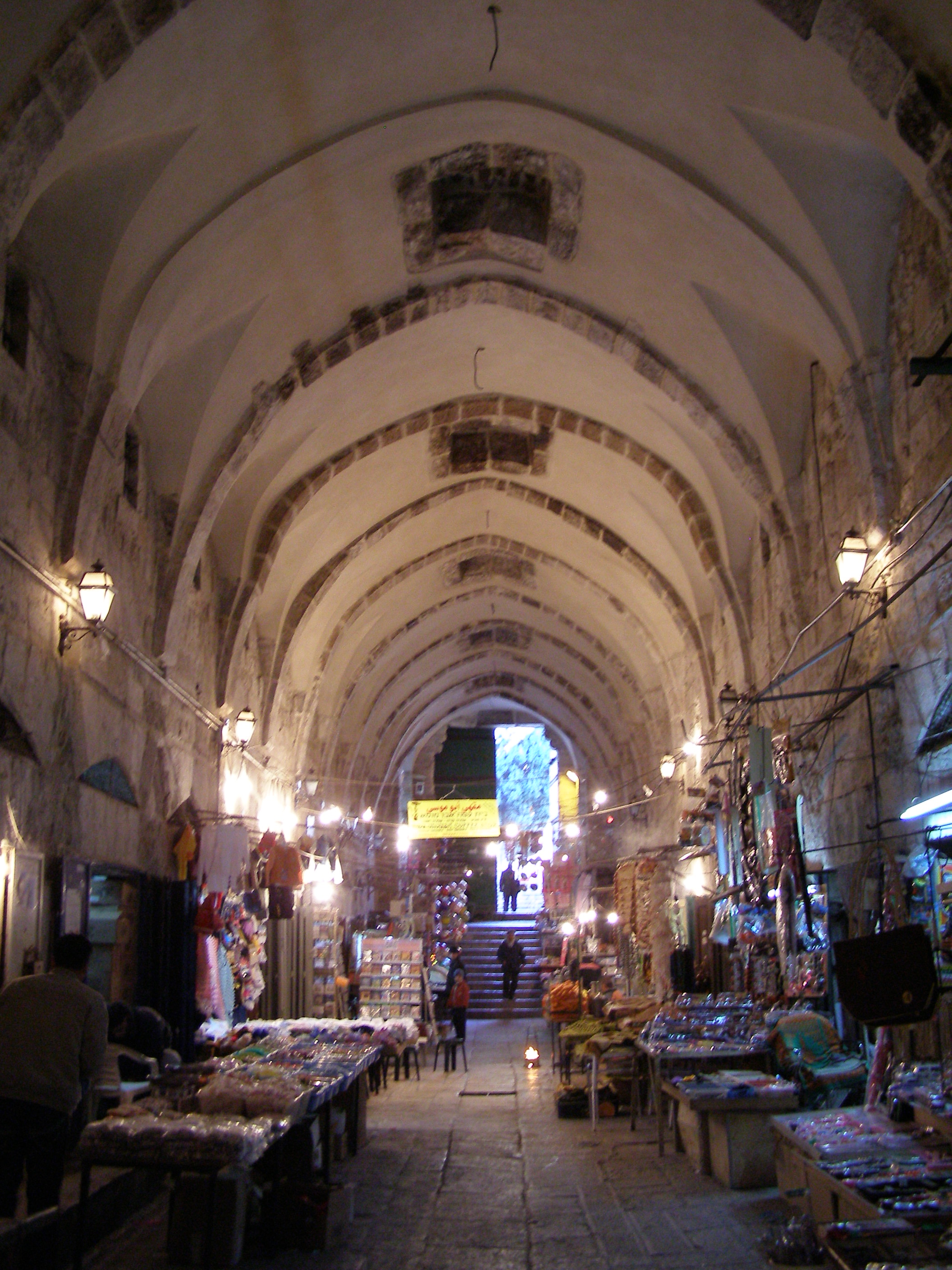 שוק הכתנים רישיון נוצר על ידי משתמש:Ranbar